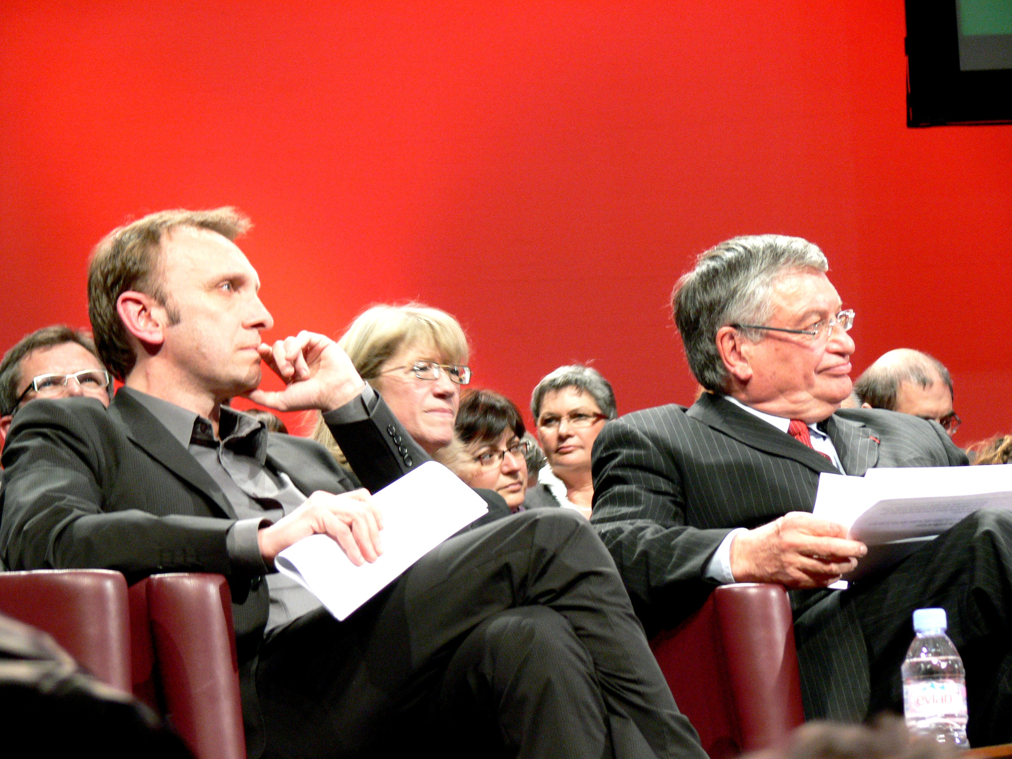 Jacques Auxiette et Jean-Philippe Magnen